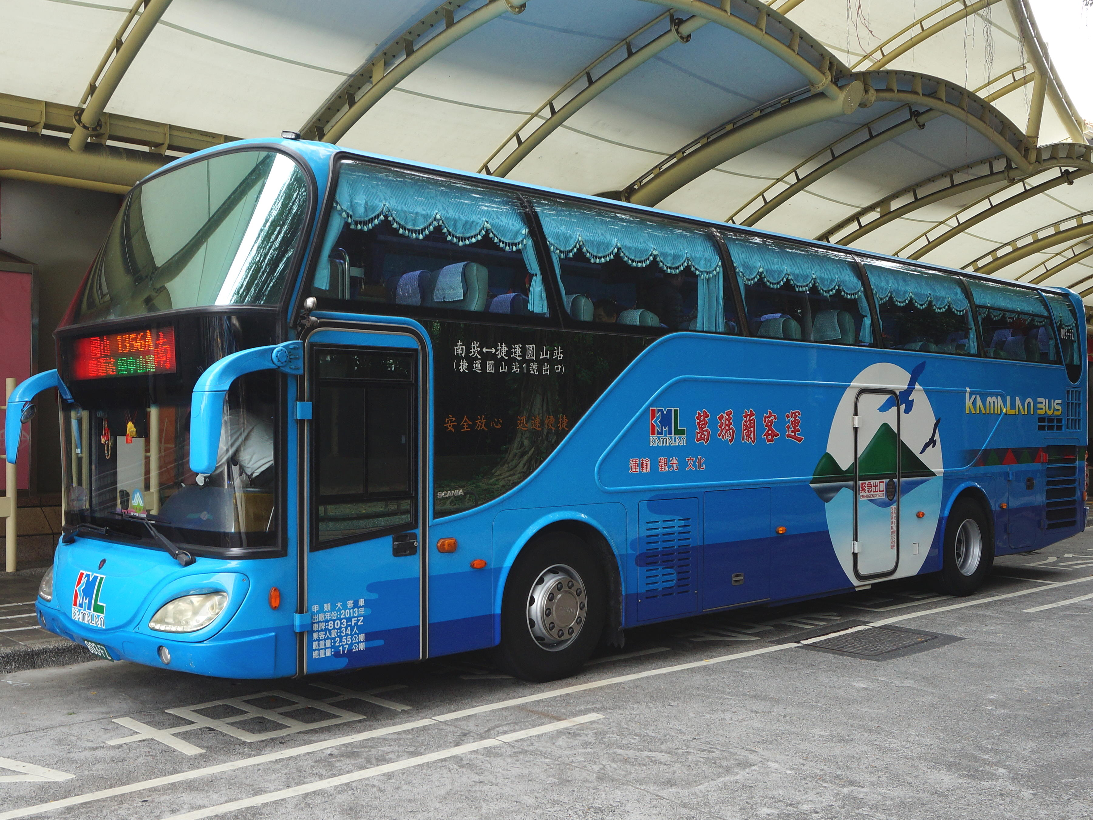 中文（台灣）: 葛瑪蘭客運2013年Scania K320IB4X2NB大客車803-FZ，行駛1356A線，停靠圓山轉運站。